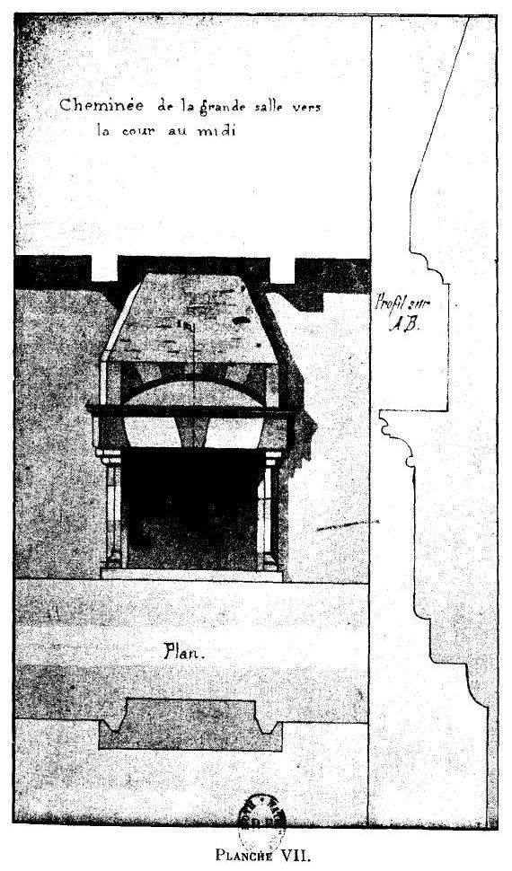 Le Donjon de Courmenant, ses origines, ses seigneurs et possesseurs, son musée